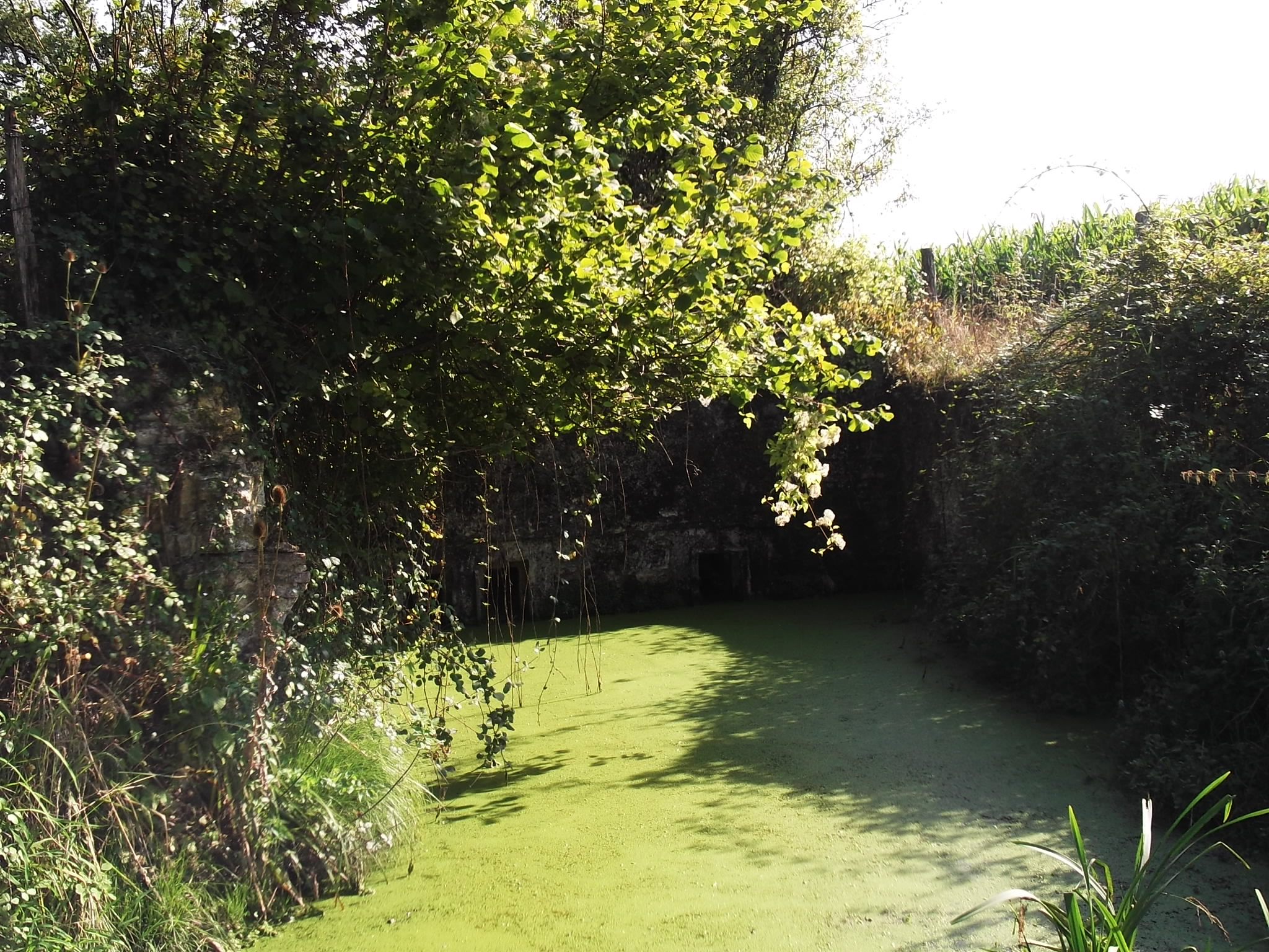 Reste du moulin à eau d'Uzan 64370